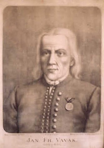 písmák Jan František Vavák